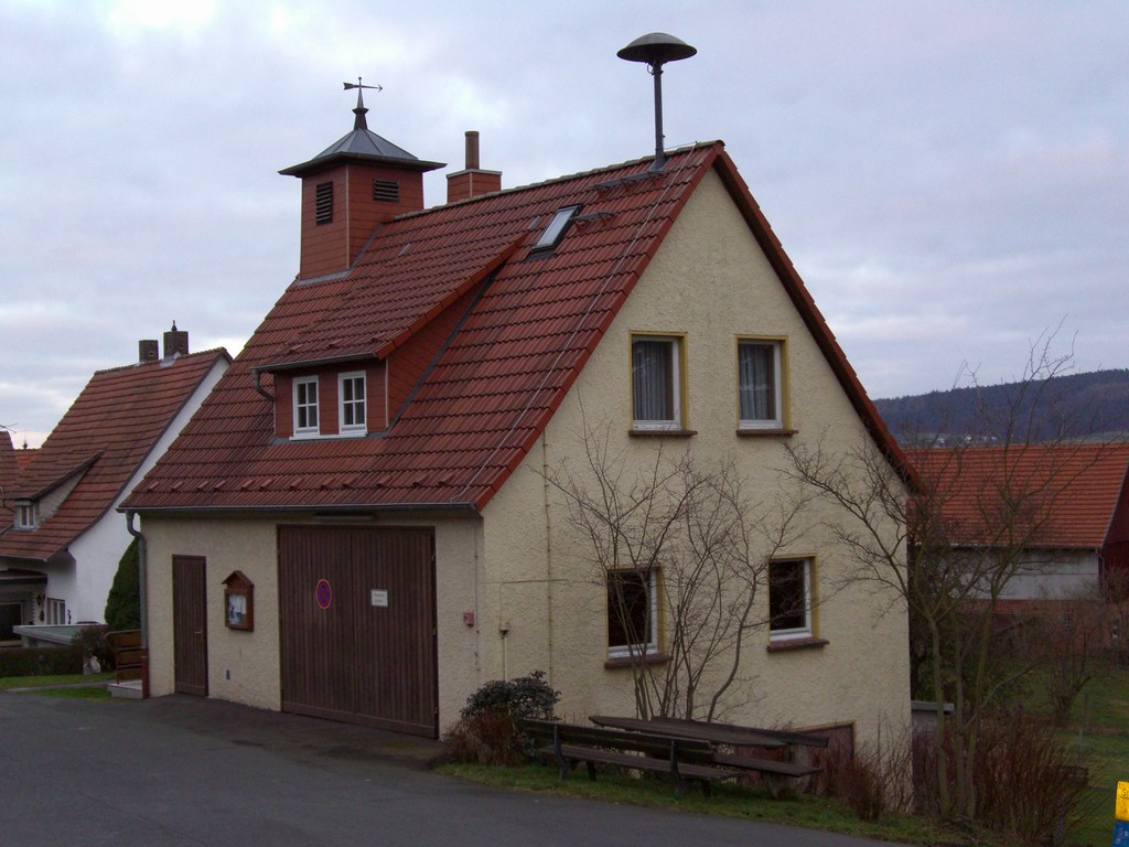 Feuerwehrgerätehaus Beiershausen